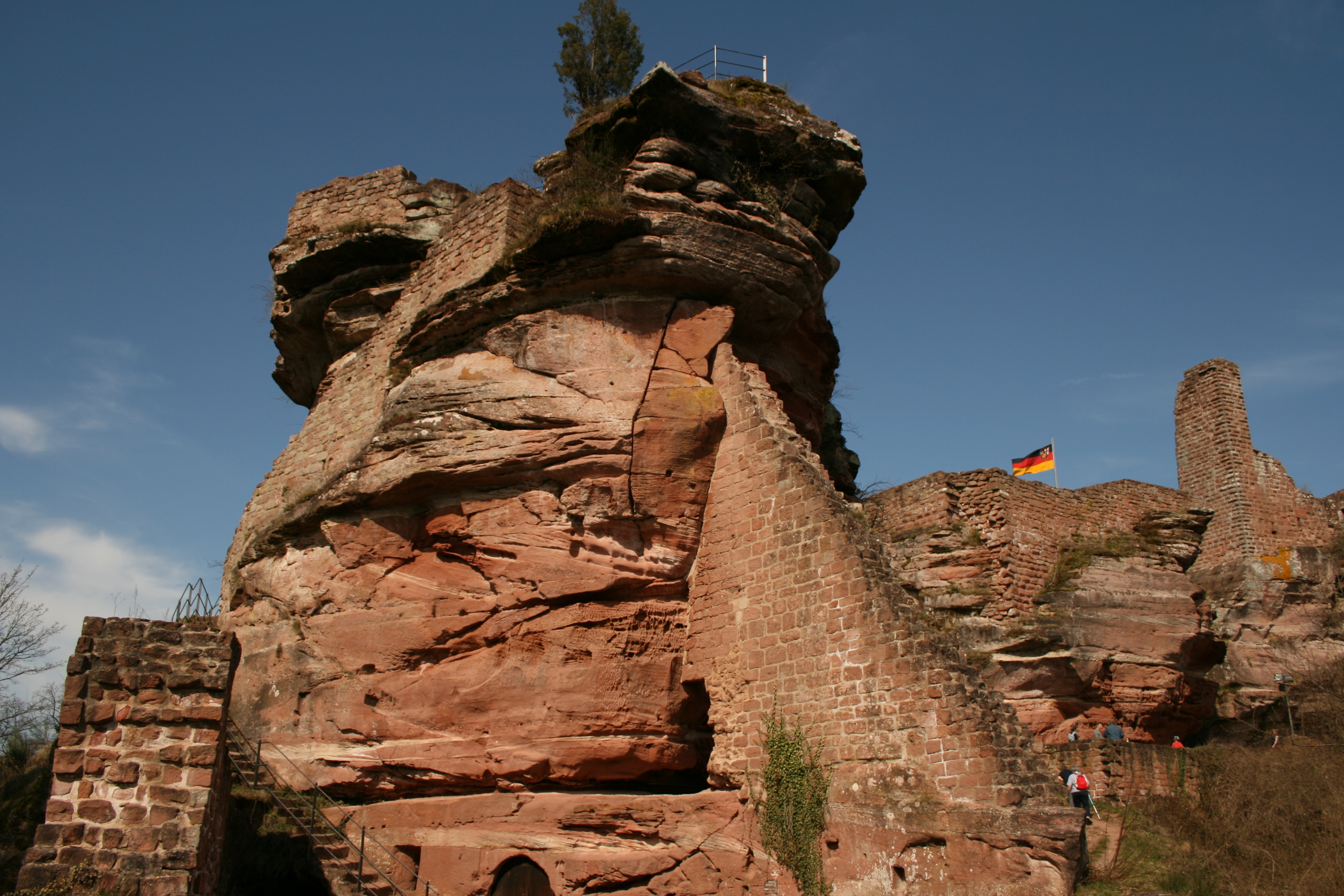 Burg Tanstein (Teil der Dahner Burgengruppe), Ansicht von Süden, aus der Unterburg.